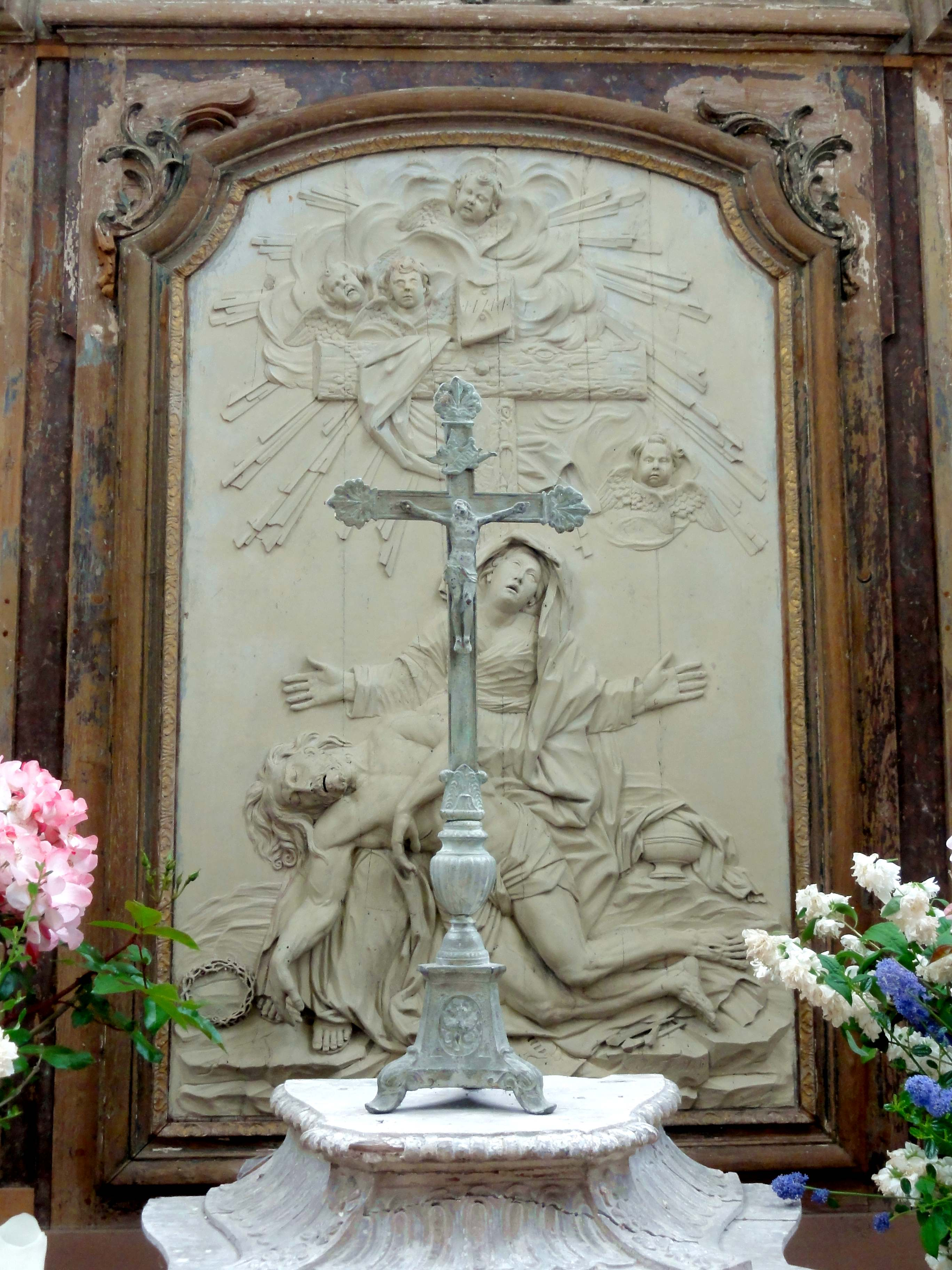 Maître-autel, retable - Pietà.